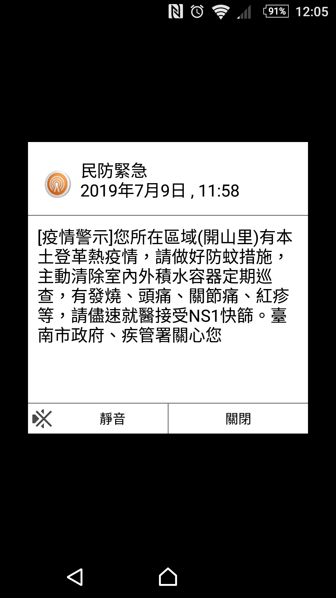 Sony Mobile智慧型手機Xperia Z2 D6503收到的臺南市中西區開山里登革熱疫情警示簡訊，發送者為臺南市政府、衛生福利部疾病管制署。